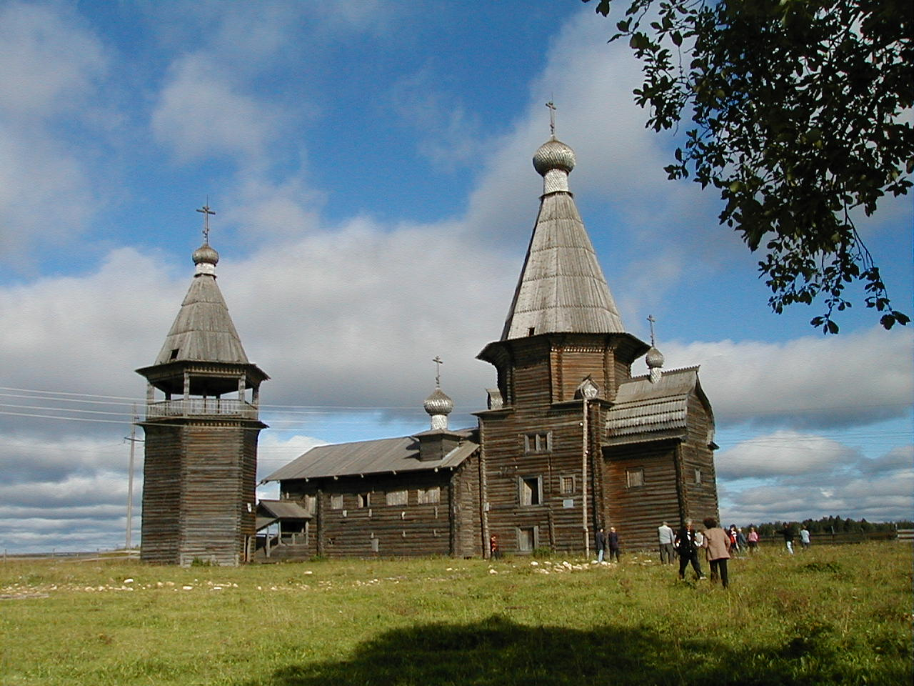 Погост Саунино (Архангельская область, Каргополь, село Саунино)